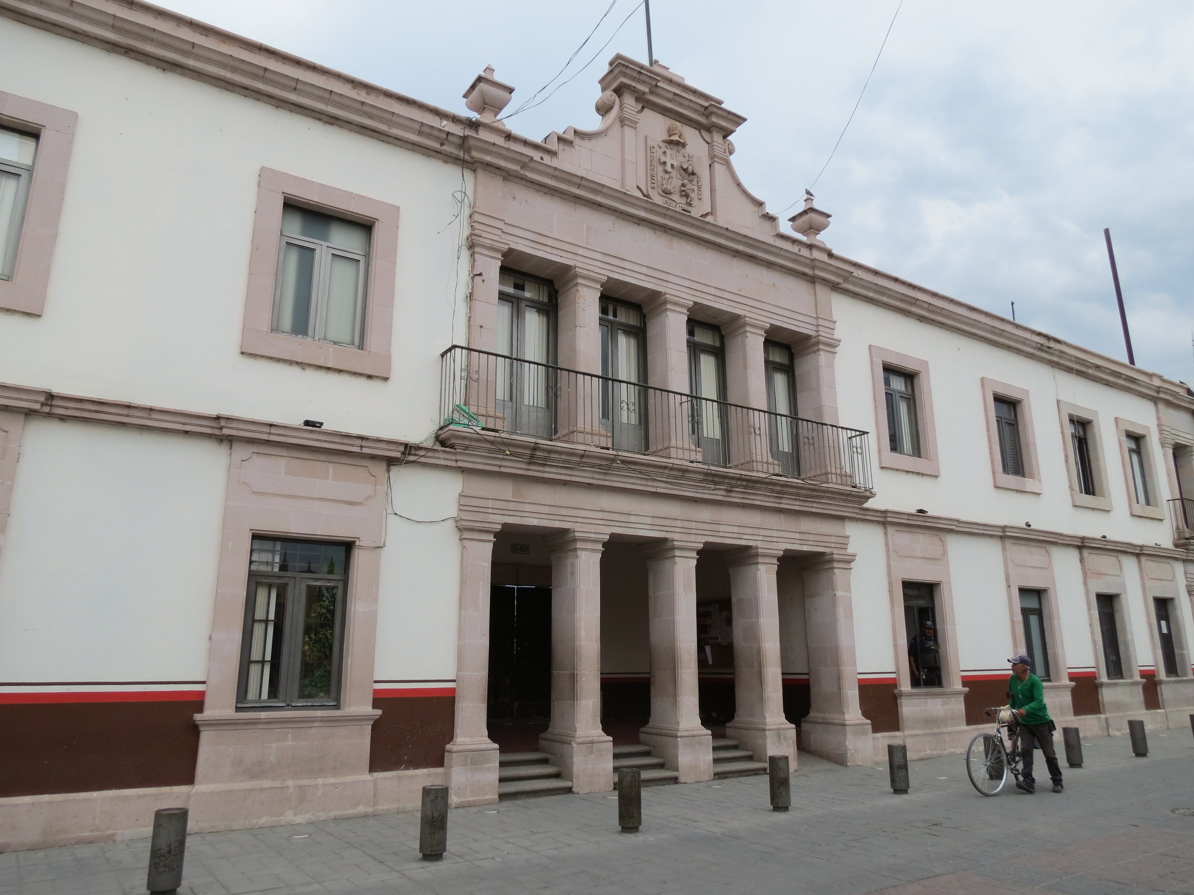 Palacio municipal de Rincón de Romos, Aguascalientes.